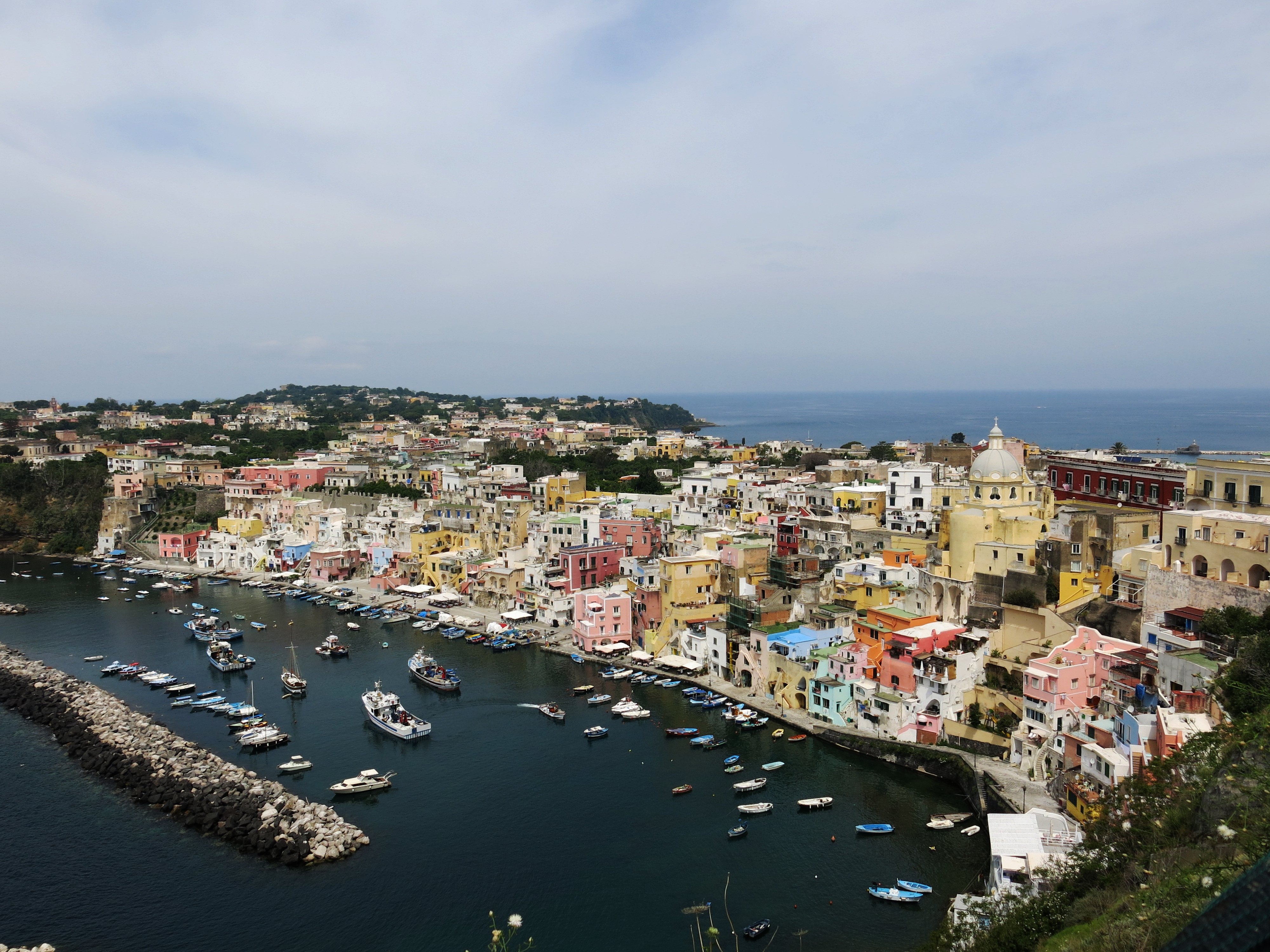 Procida 2015